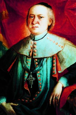 Adalbert von Falkenstein, Bischof von Szeged-Csanád, stammte aus Freiburg im Breisgau